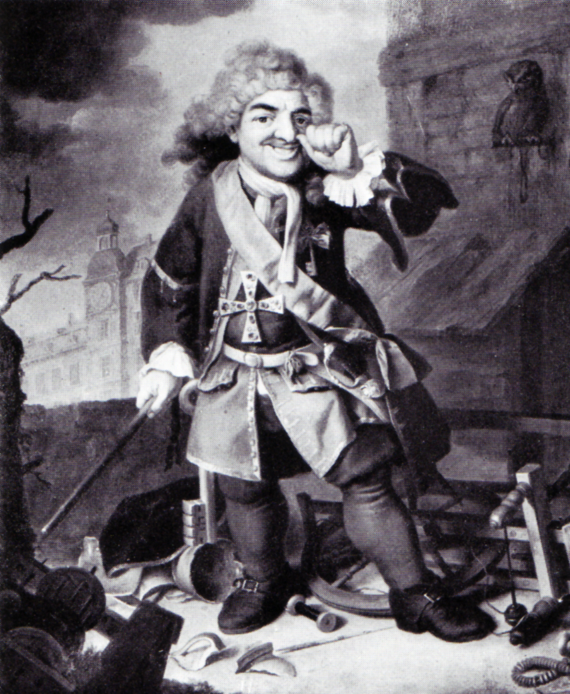 Perkeo (1702-1735), kurpfälzischer Hofzwerg